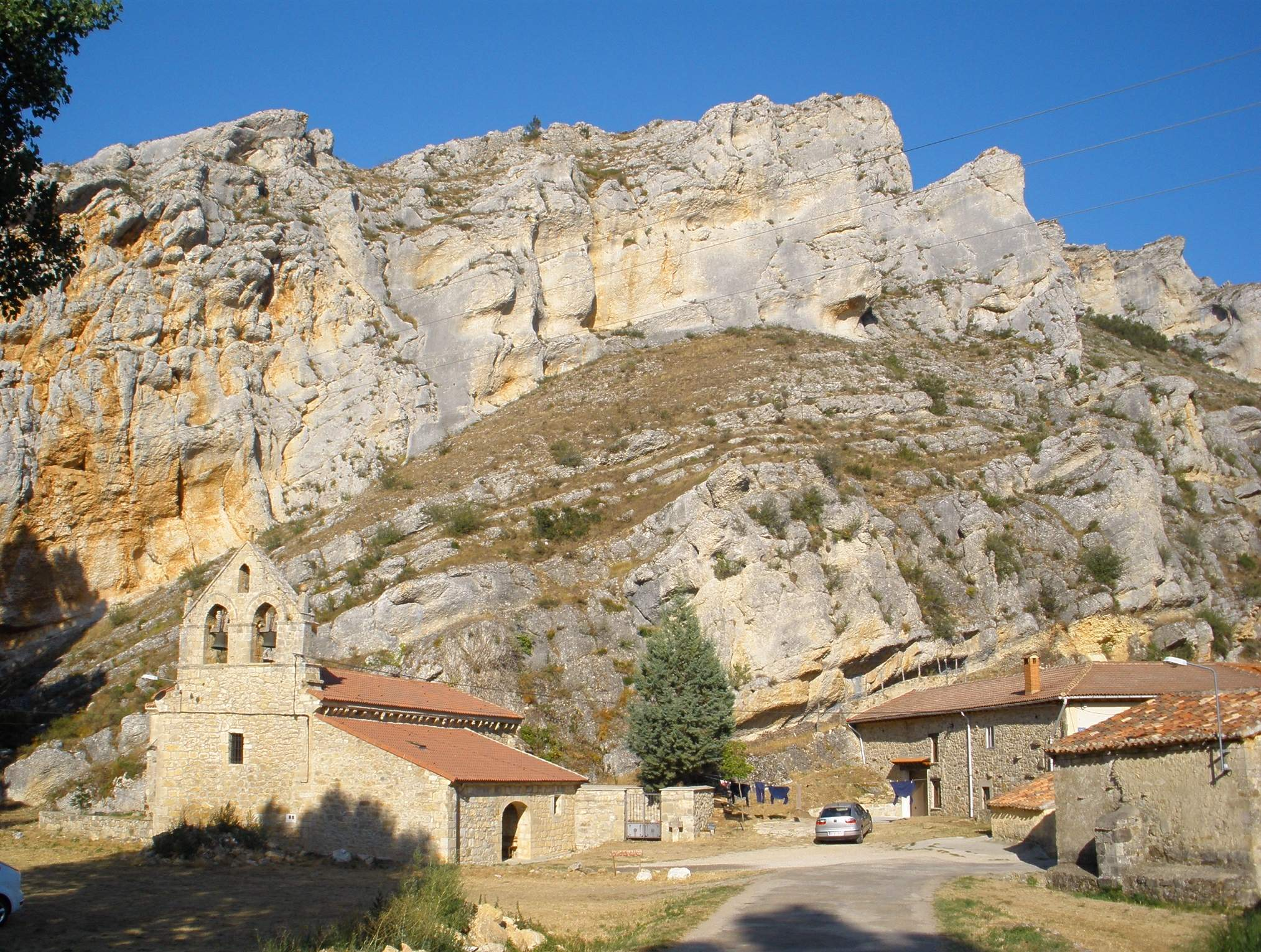 Hoyos del Tozo (Burgos)